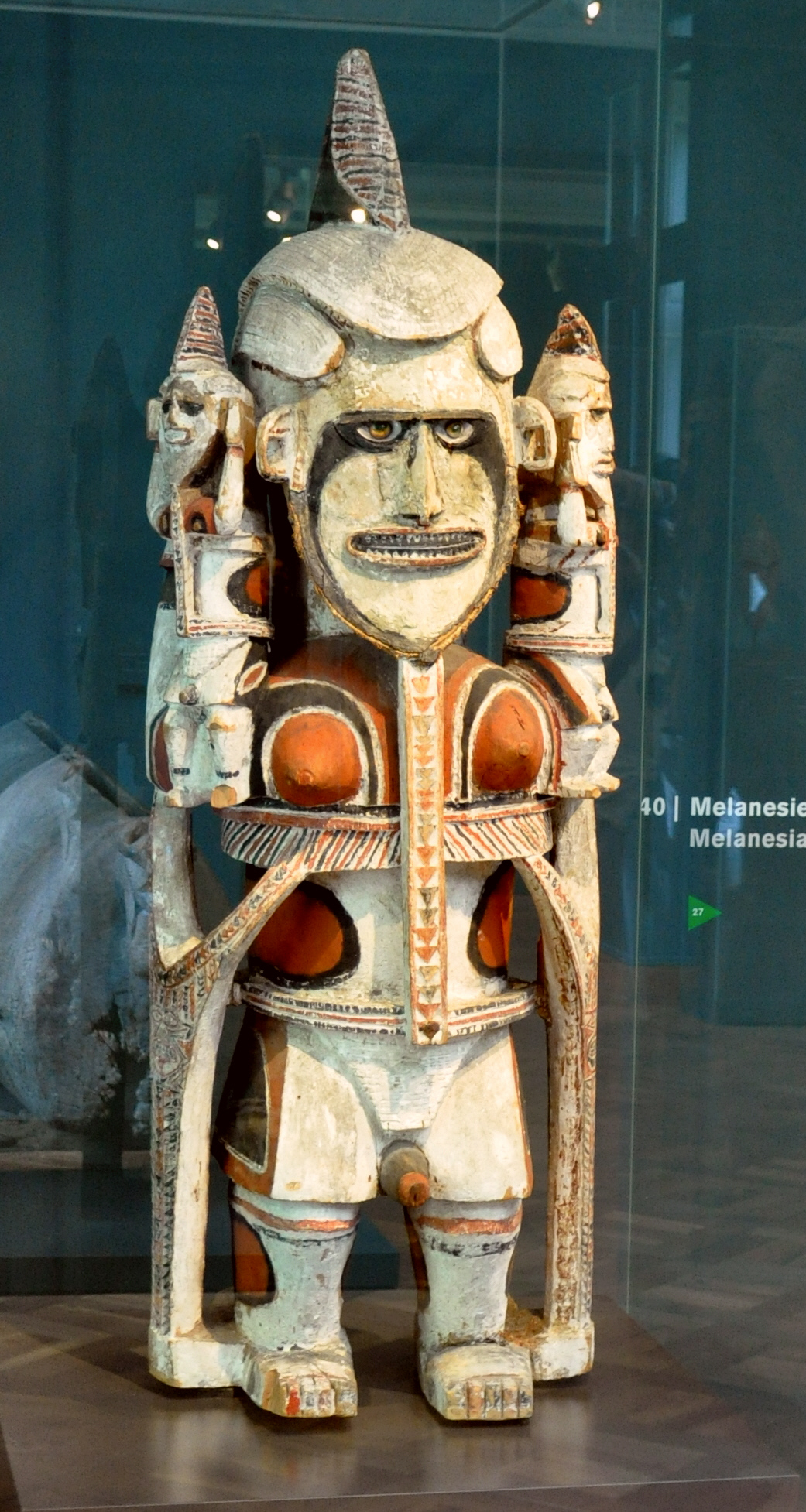 Kultfigur nalik (bei den Uli-Festen verwendet), Papua-Neuguinea, Provinz Neuirland, Mandak-Region, 19. Jh. Holz, Kaurischnecke, Verschlussdeckel der Turbanschnecke, Bastfasern, Farbpigmente Museum Rietberg, Zürich; Geschenk Eduard von der Heydt, Inv. Nr. RME 431